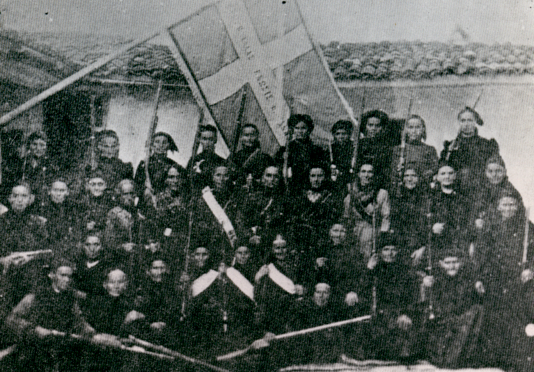 Βορειοηπειρώτησσες στην Κορυτσά (1913-4)